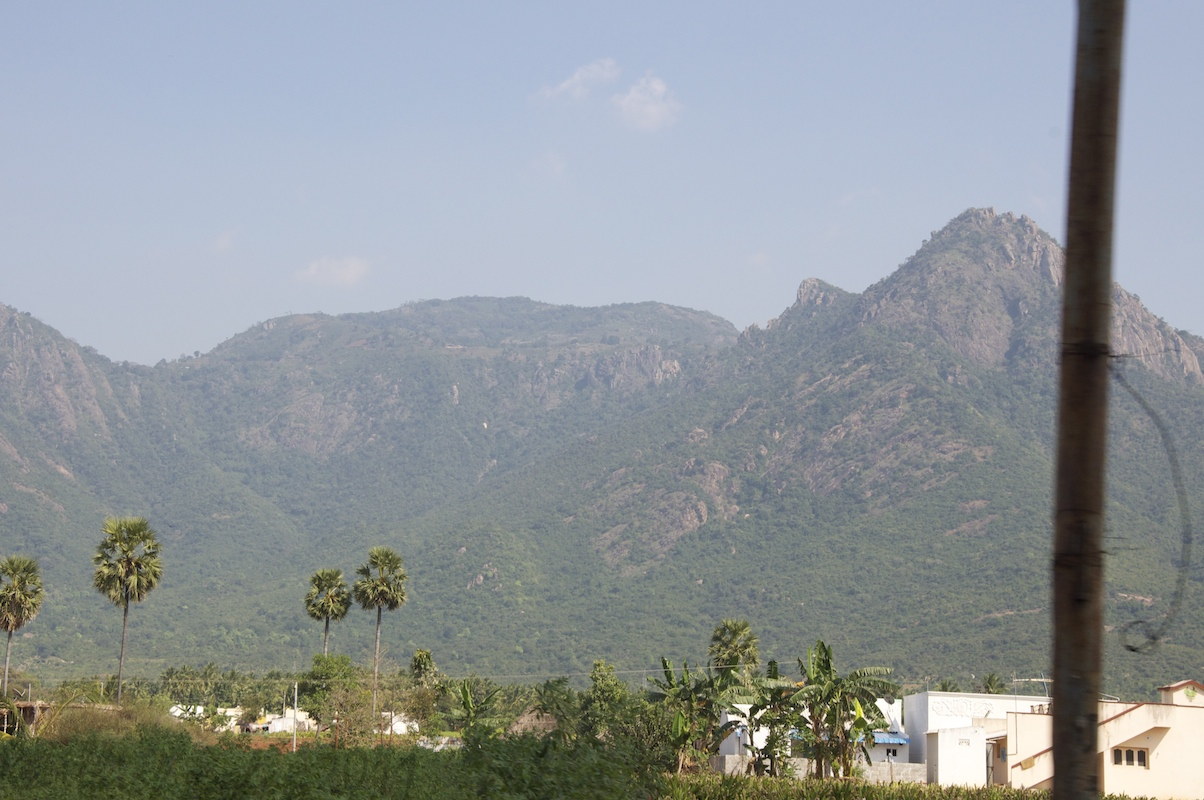 நாமக்கல் மாவட்டம் பேளு�க்குறிச்சியில் இருந்து கொல்லிமலையின் தோற்றம்.